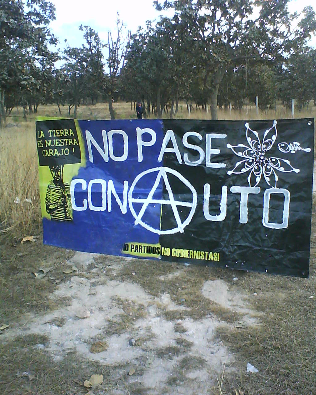 Aviso en la entrada al bosque el nixticuil para la prevención de afectaciones en las areas de reforestación autonoma del Comité Salvabosque.